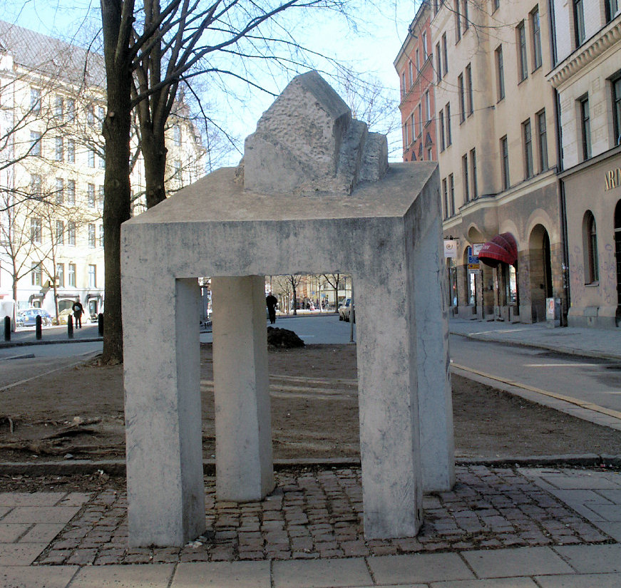 Stilleben by Eugen Krajcik, Stockholm, Sweden.